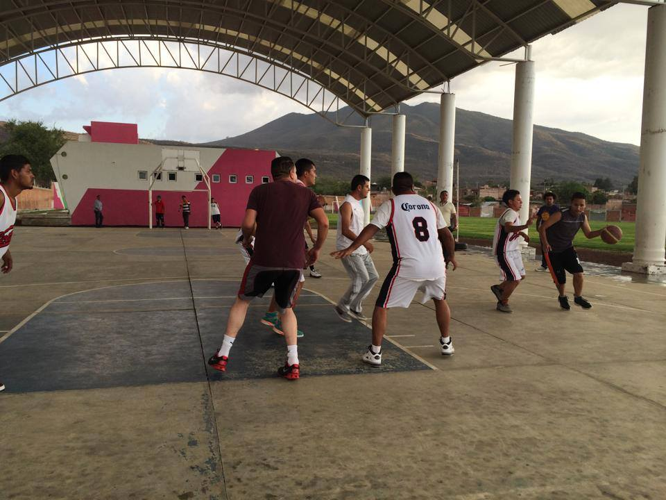 unidad Ecuandureo